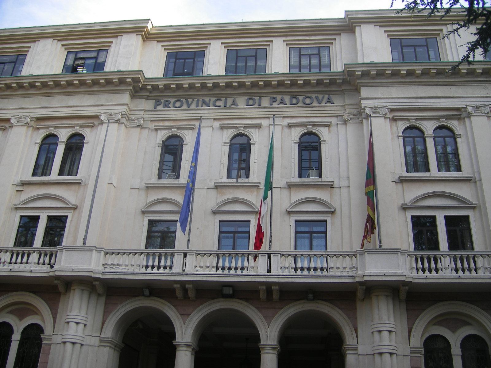 Padova - Provincial Administration